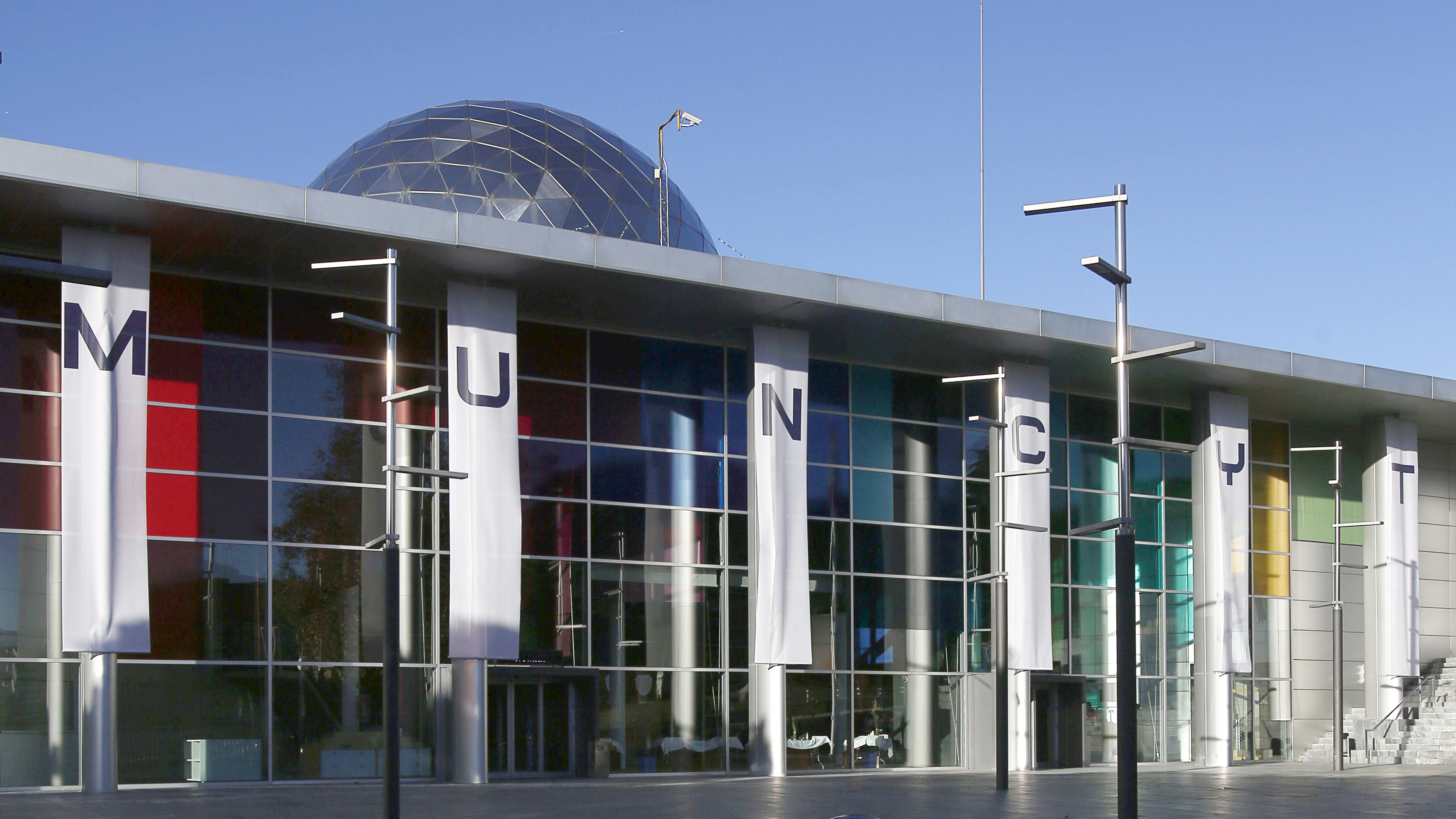 Fachada del Museo Nacional de Ciencia y Tecnología de Alcobendas, Madrid